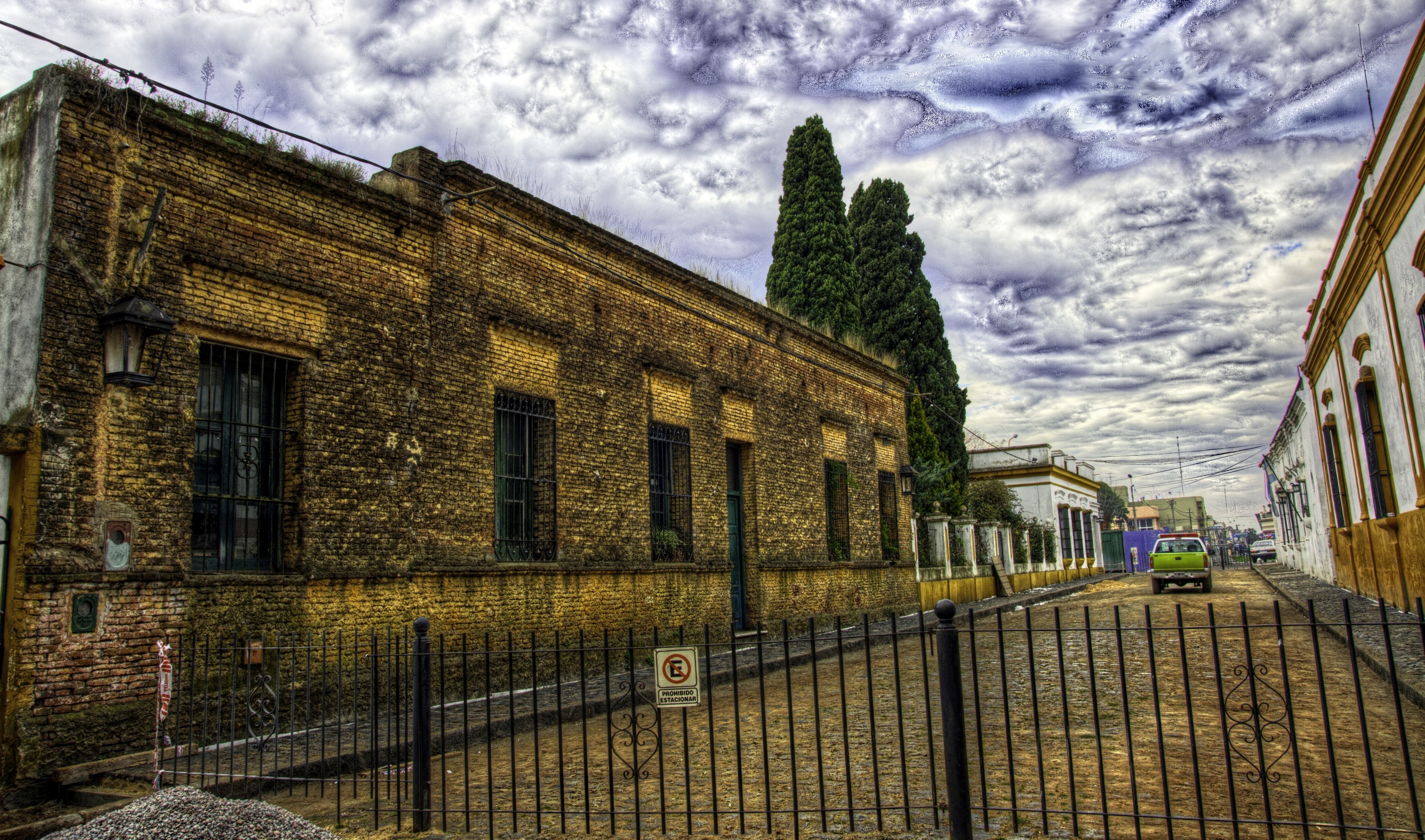 Luján, provincia de Buenos Aires, Argentina.